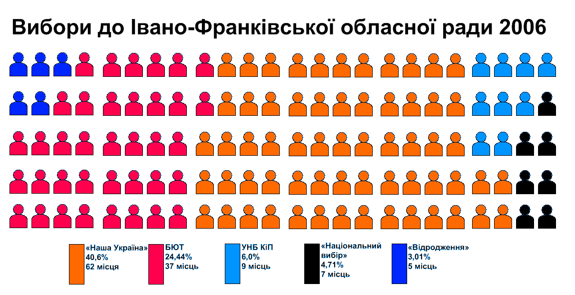 Розподіл депутатських мандатів у Івано-Франківській обласній раді за результатами виборів до Івано-Франківської обласної ради 2006 року